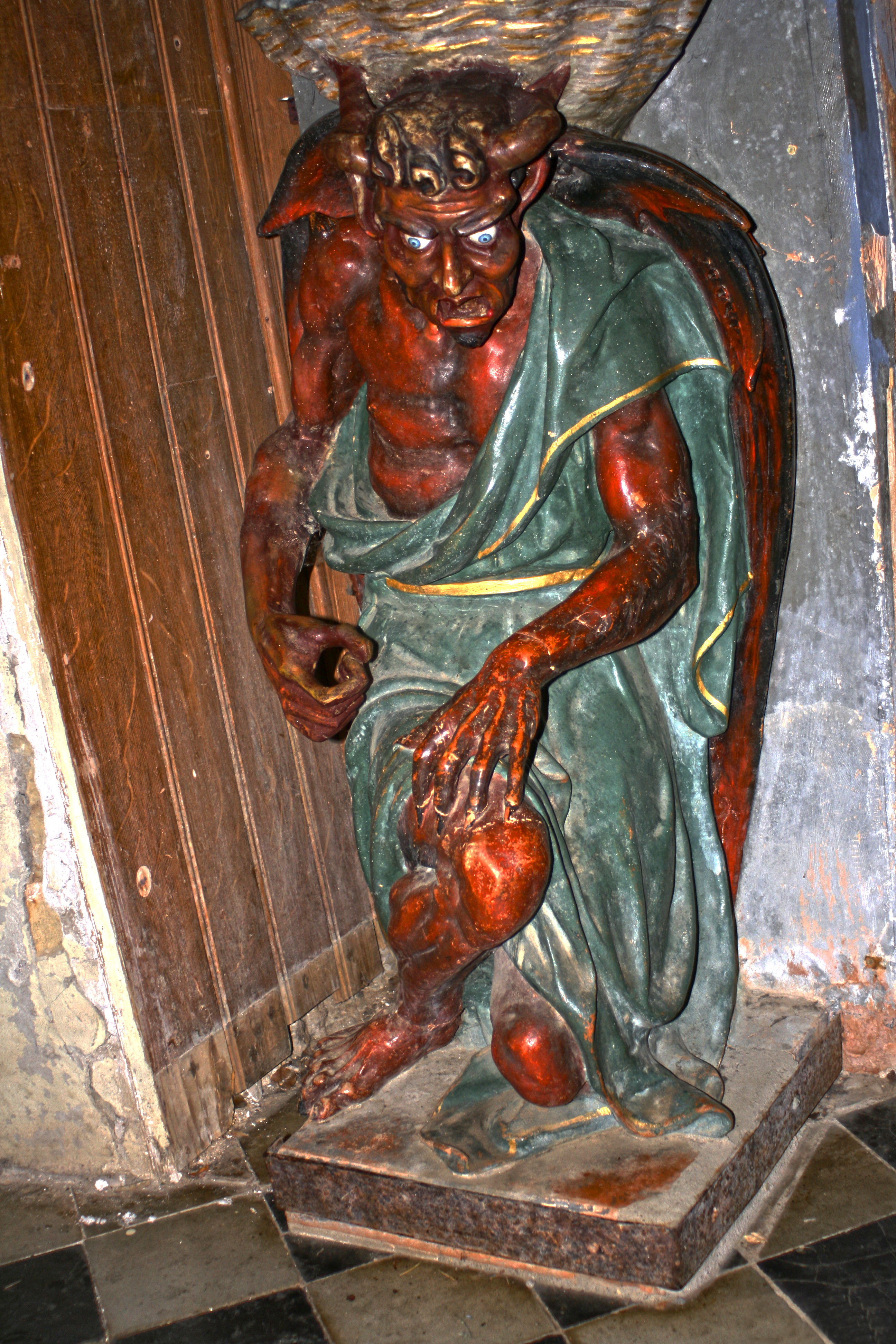 Asmodeo en la iglesia de Rennes-le-Château (Francia) France